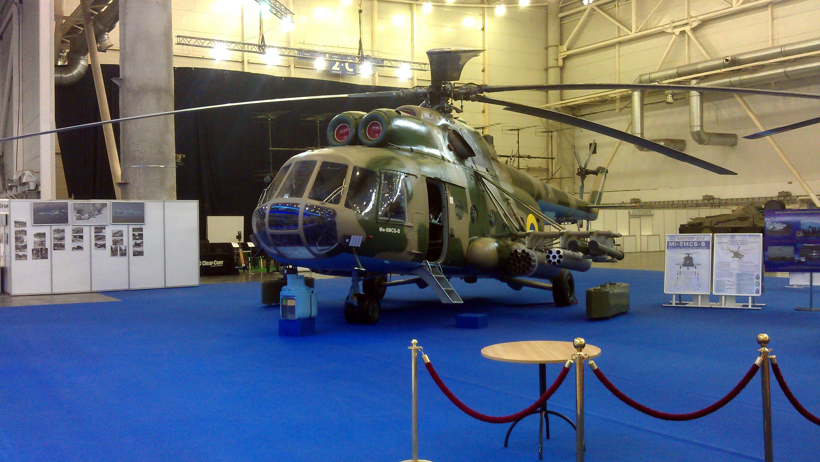 Военно-транспортный вертолет Ми-8МСБ-В. Выставка "Зброя та безпека", Киев, сентябрь 2015 г.